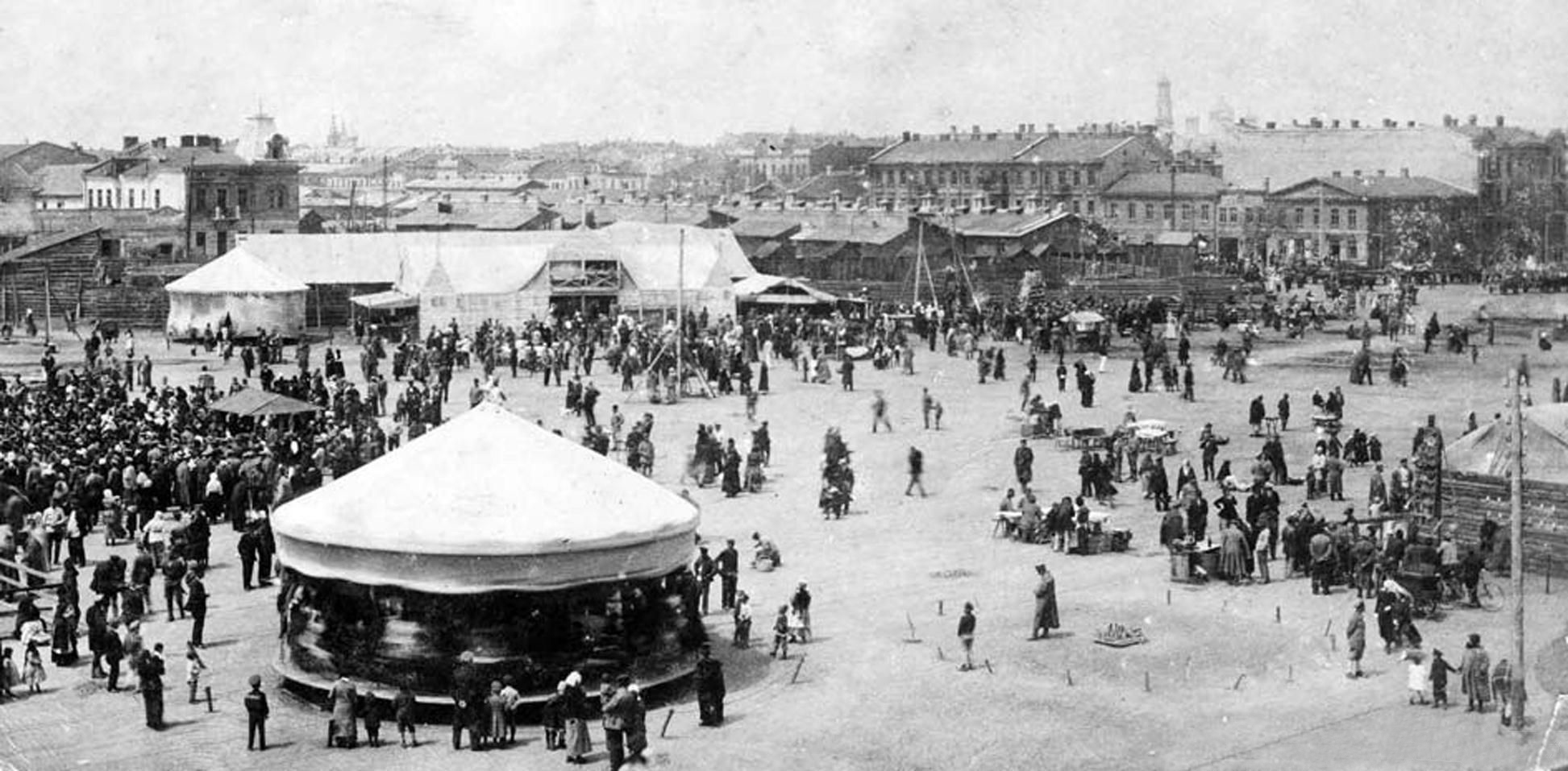 Ярмарок на одеському Куликовому полі